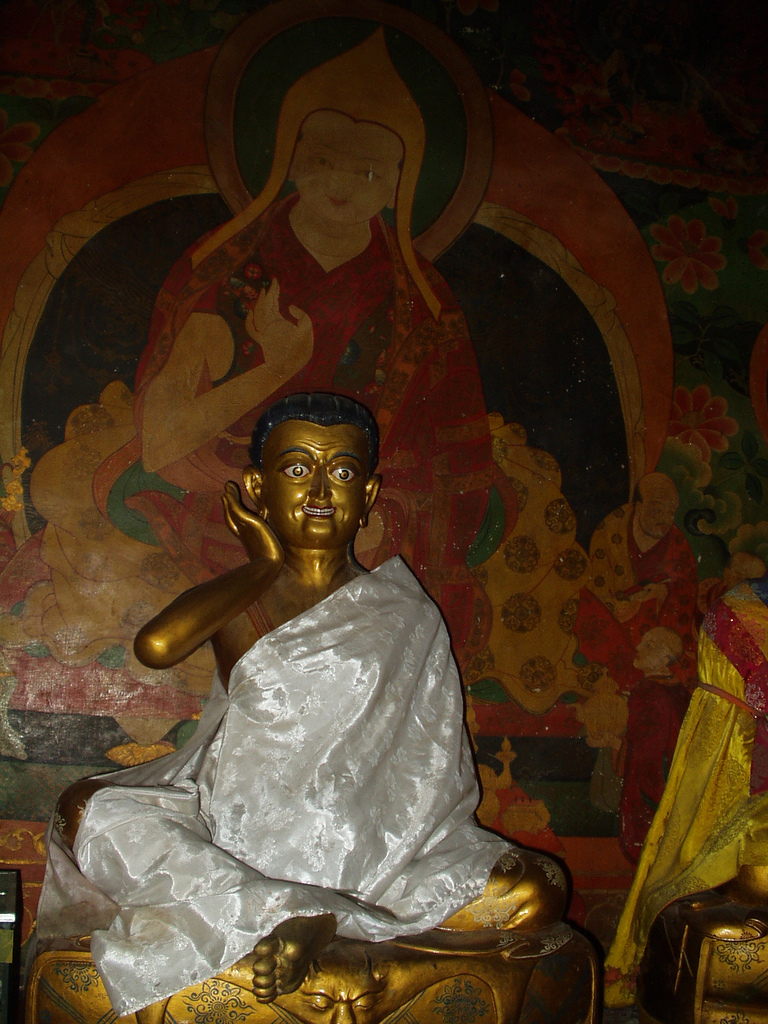 foto fatta da me.